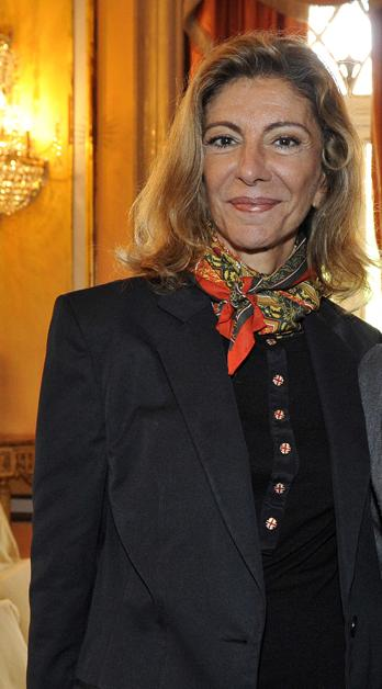 A atriz Marília Pêra, em 2012.